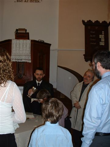 Unitarian baptism